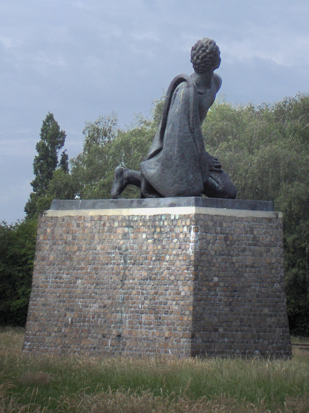 « De politieke gevangene », bronze statue by Idel Ianchelevici (1947), honouring the victims of the Fort van Breendonk, Belgium